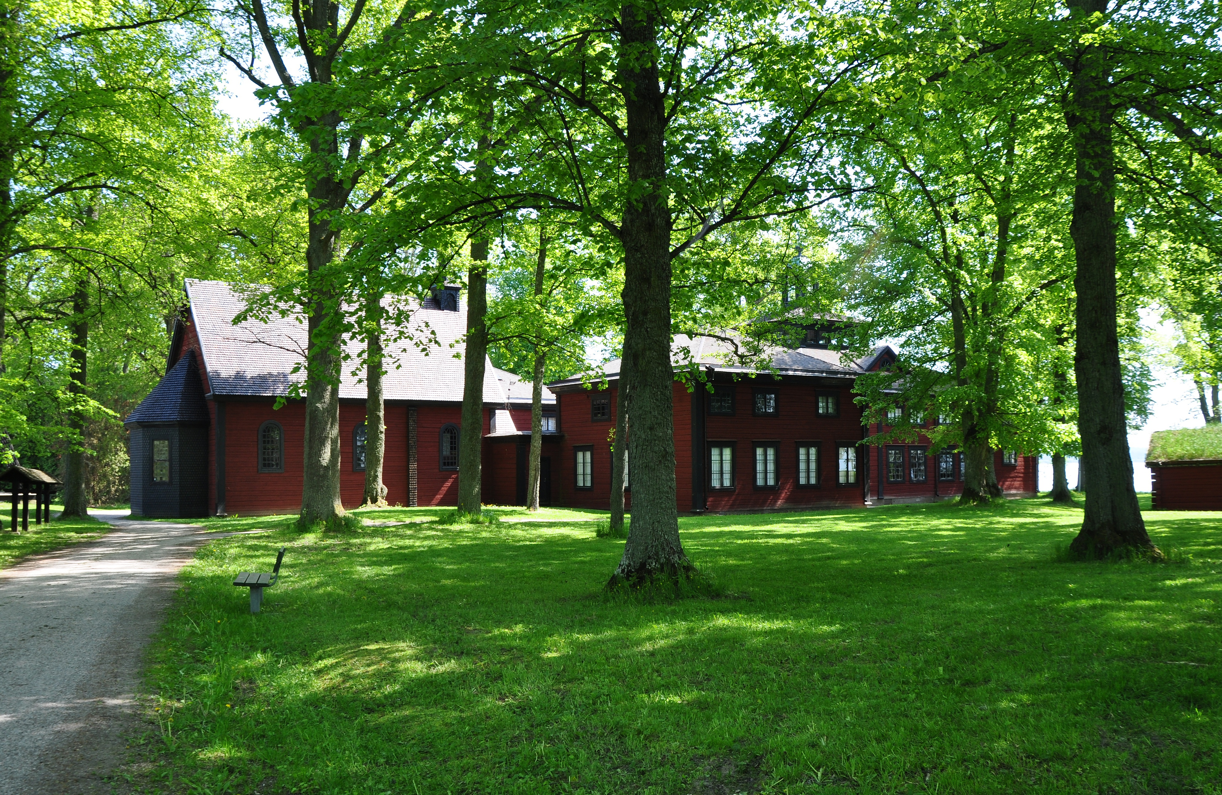 Skansenkyrkan i Julita friluftmuseum